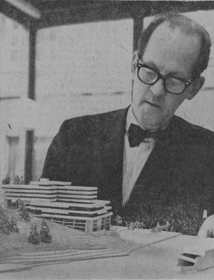 Harry Egler med modell av hotell i Norrtälje